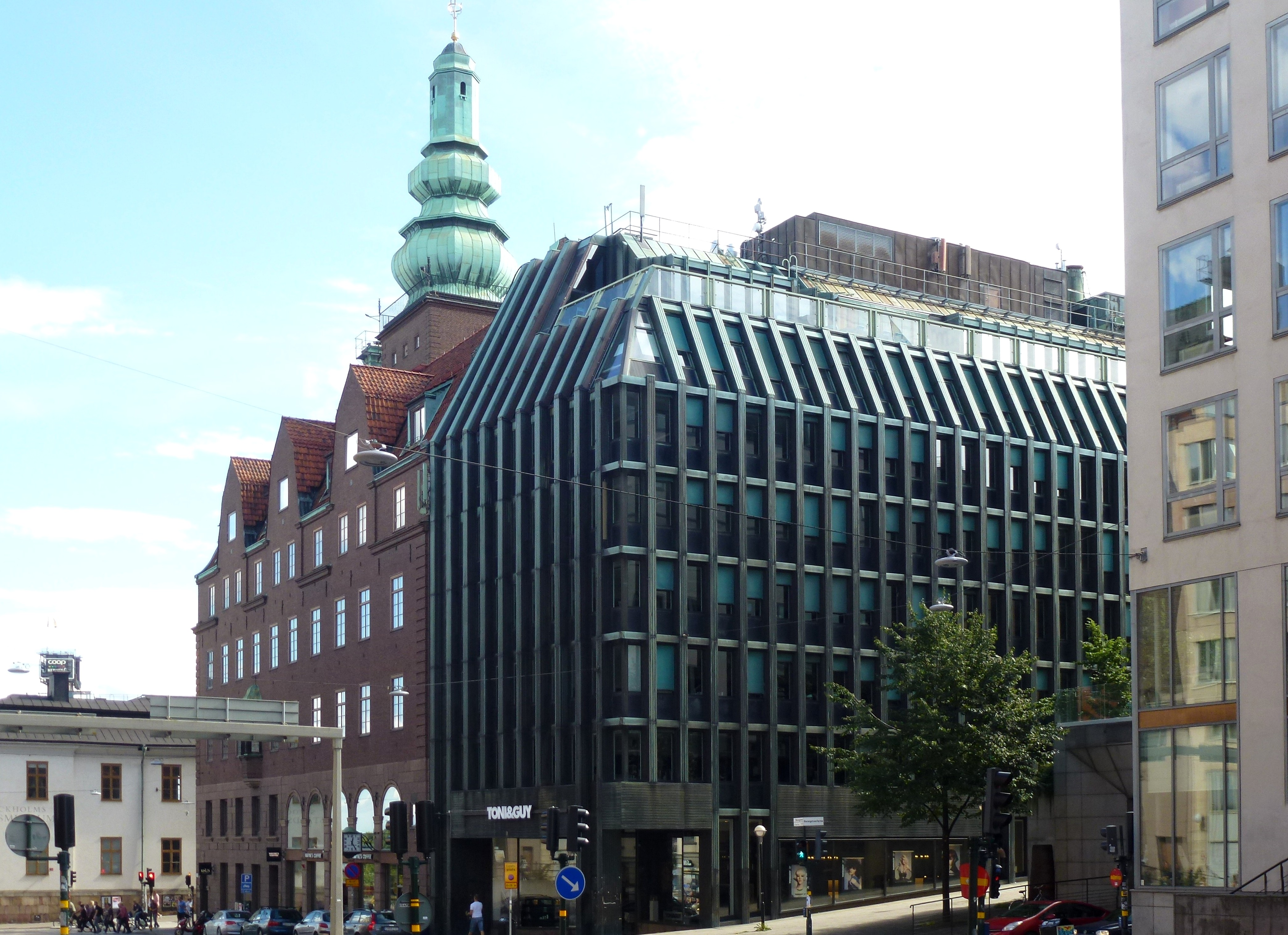 Kvarteret Jupiter större, Horngatan 1-7, byggnaden för Stockholms enskilda bank, arkitekt Ivar Tengbom (1915)